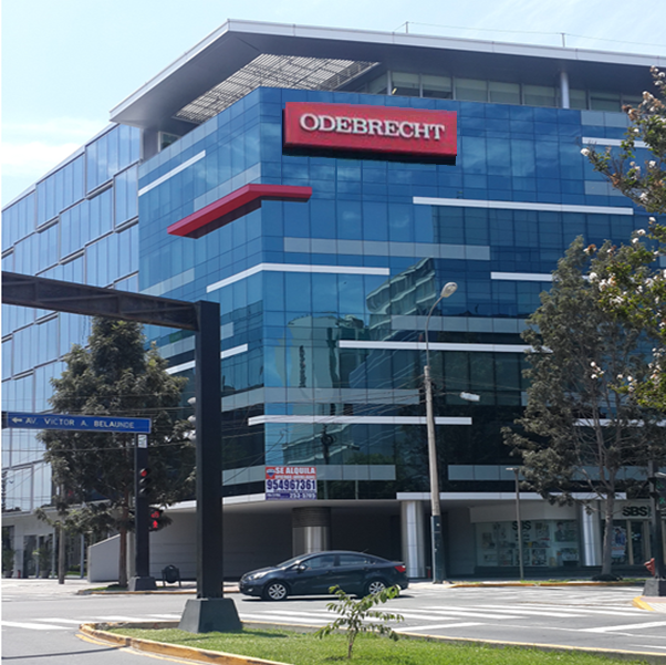 Centro empresarial de Odebrecht en Lima, Perú.